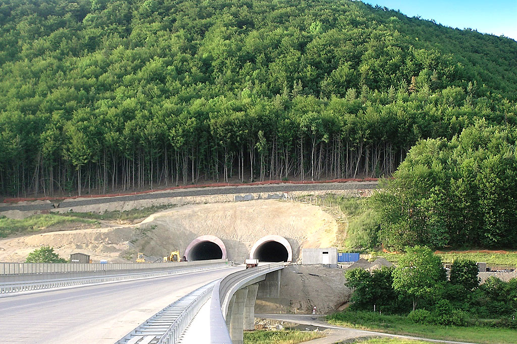 A71 Eichelbergtunnel Südportal, im Vordergrund die Jüchsetalbrücke